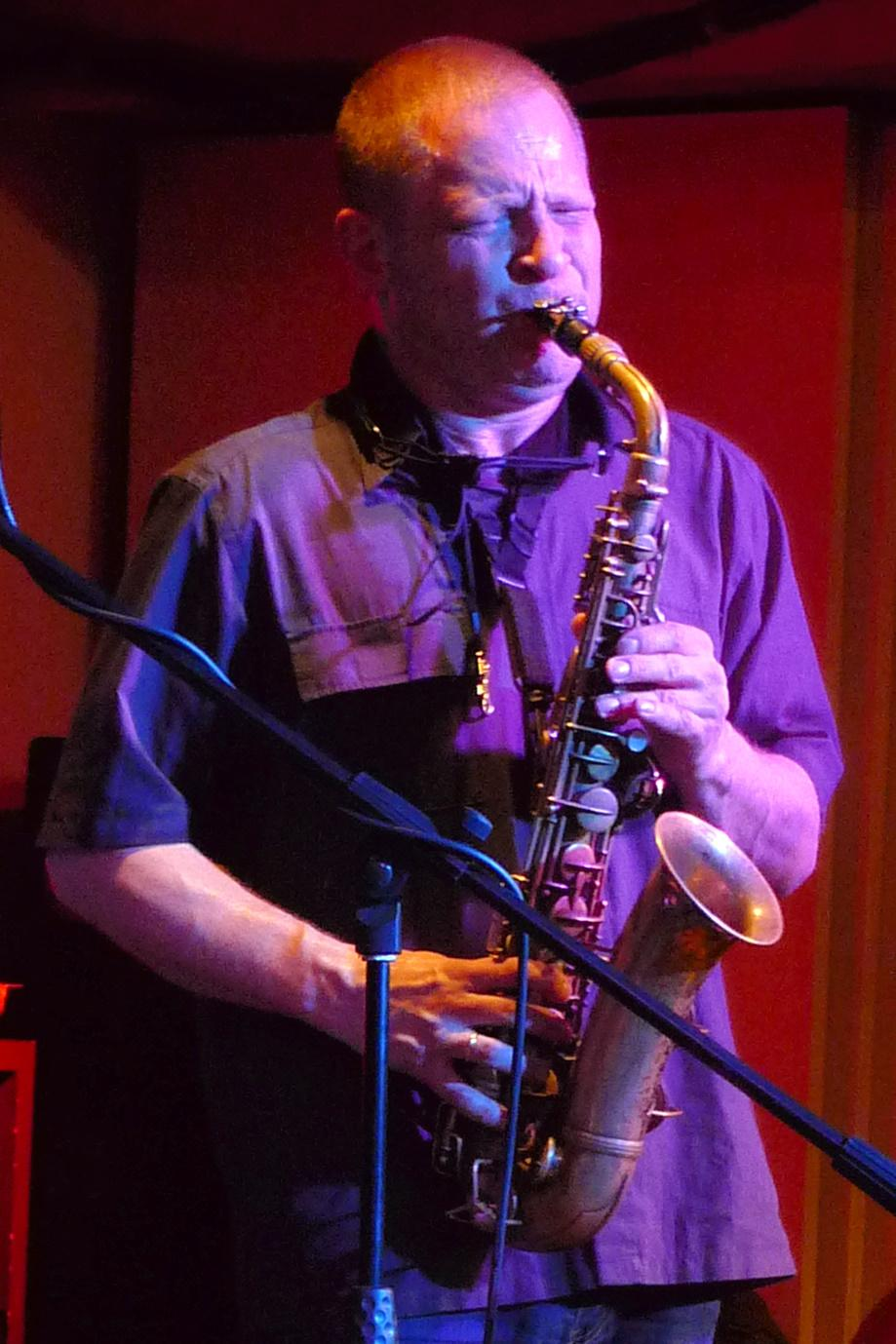 Mikołaj Trzaska, gdański saksofonista i klarnecista.